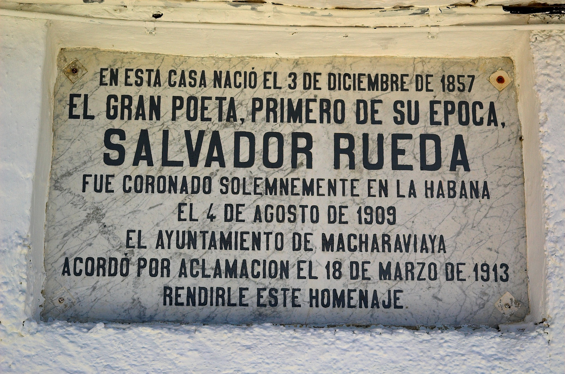 Inscripción sobre la puerta de la casa natal